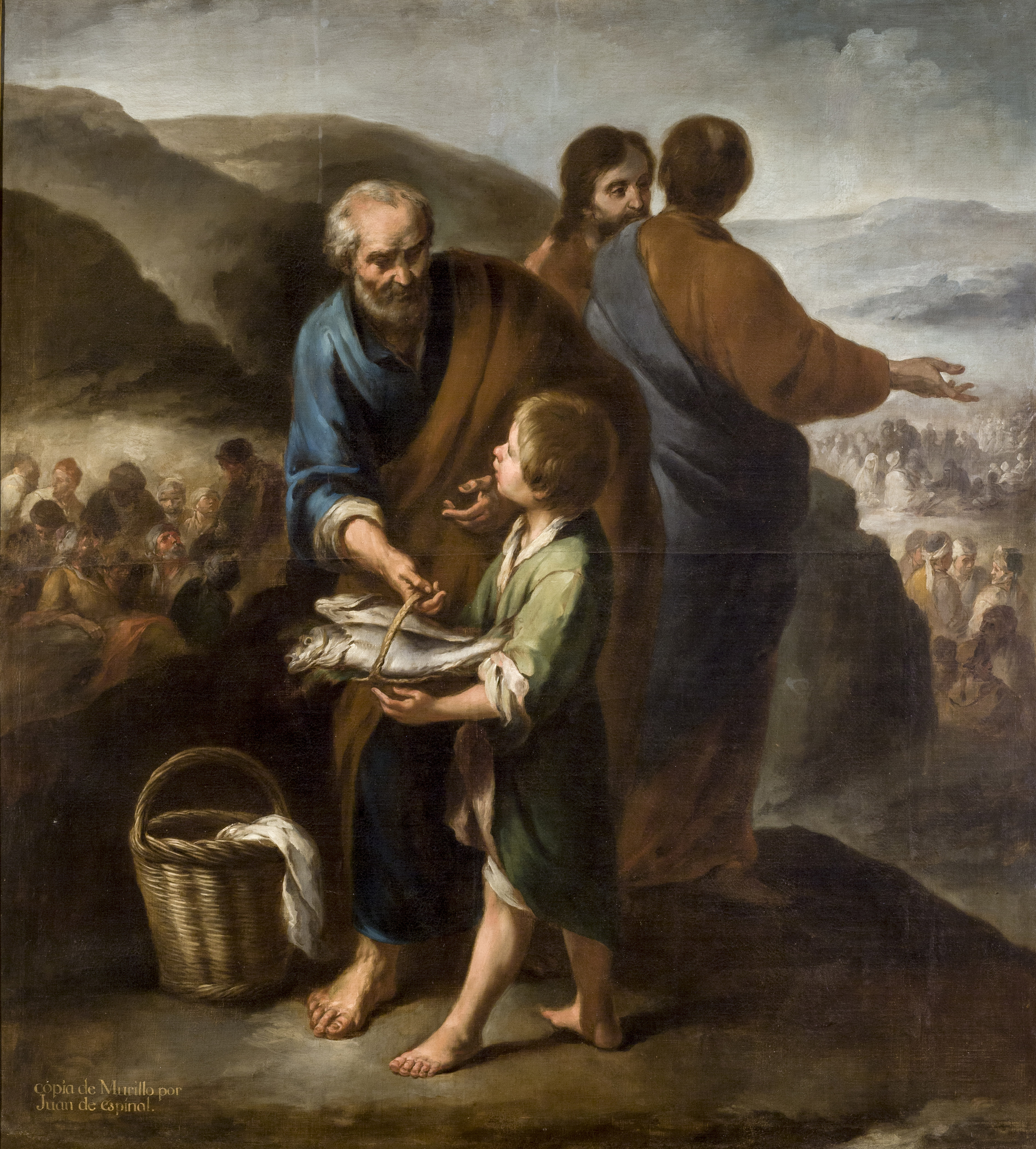 La obra representa la Multiplicación de los panes y los peces, que fue uno de los milagros realizados por Jesucristo durante su vida pública.